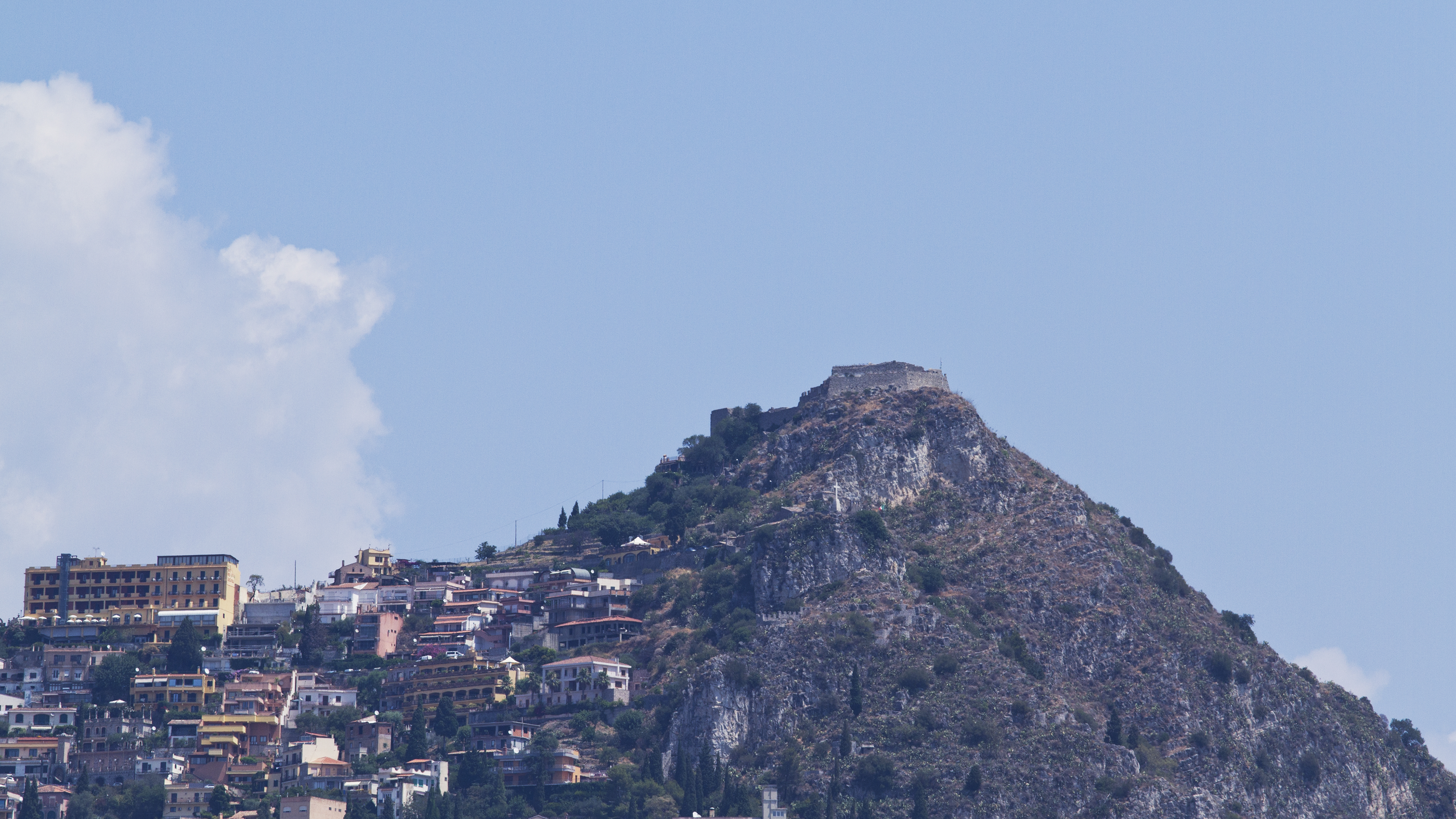 Taormina